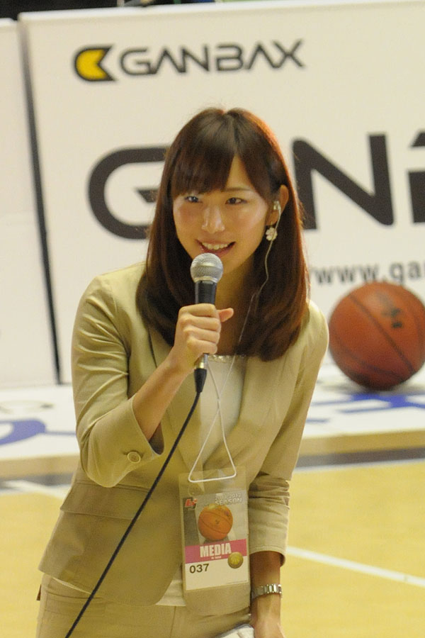 秋田朝日放送、塩地美澄アナウンサー。秋田県立体育館で。